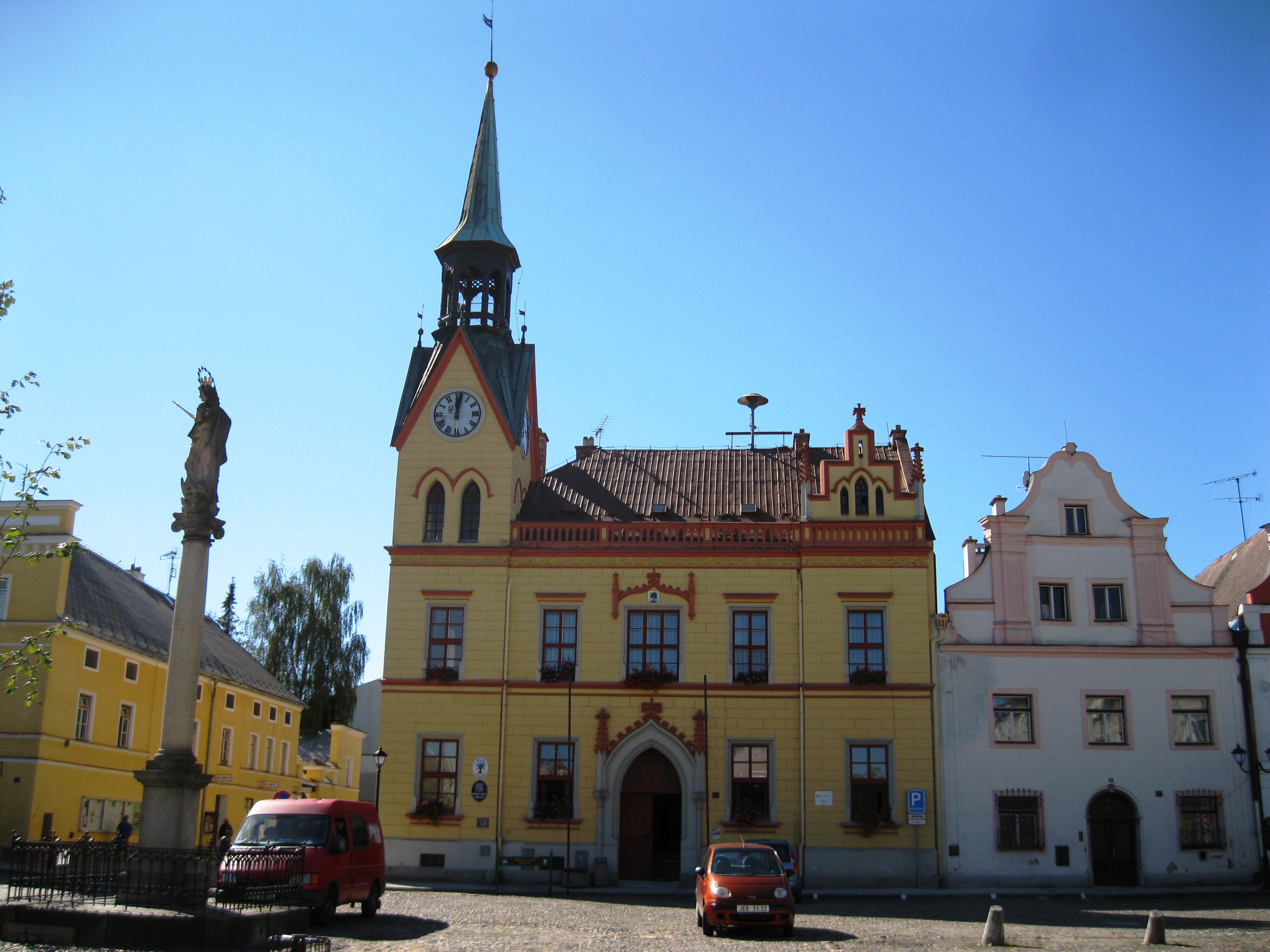 Radnice (Vidnava), nároží Mírové nám. a Radniční 80, Vidnava